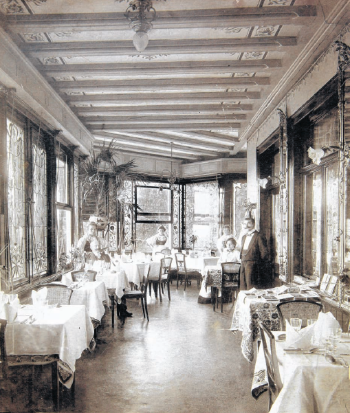 Das Schwarzwaldhotel Waldlust in Freudenstadt um das Jahr 1900 mit Hotelier Ernst Luz (sitzend links).